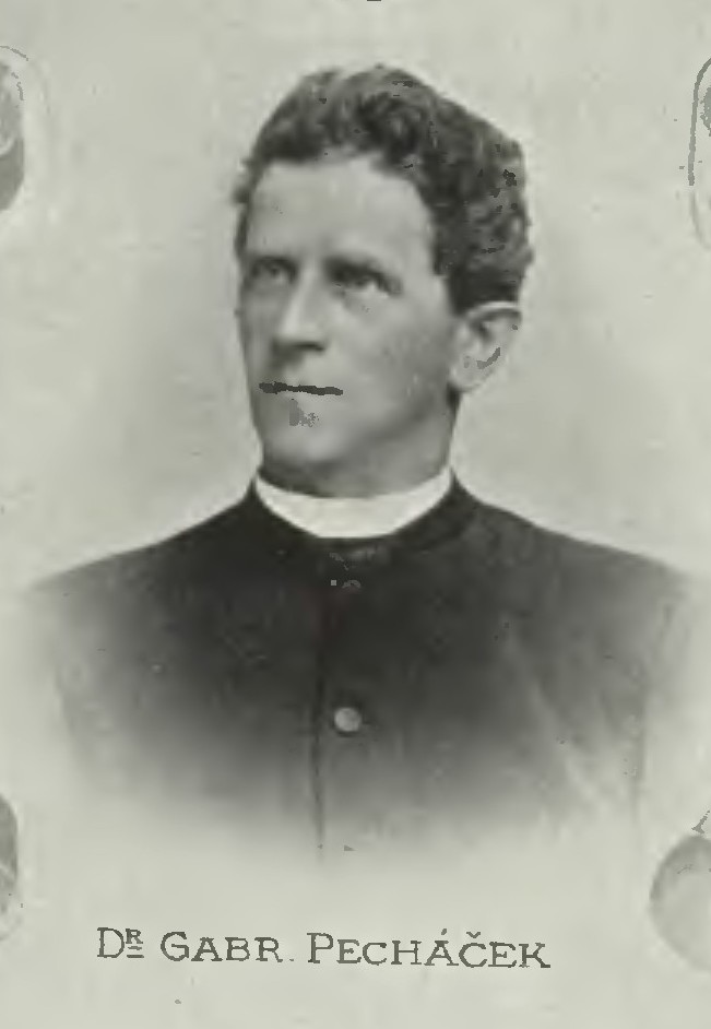 Portrét – Gabriel Pecháček (1855-1931), Český kokatolický teolog.